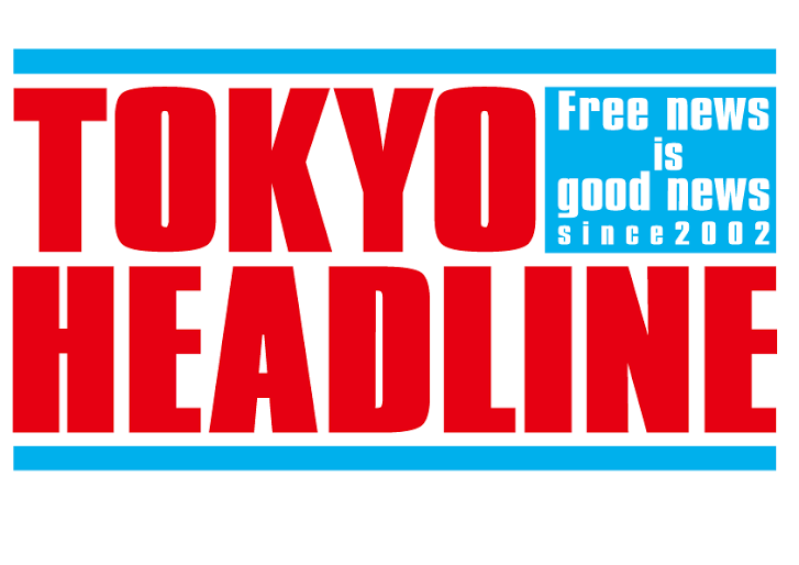 TOKYOHEADLINEのロゴ